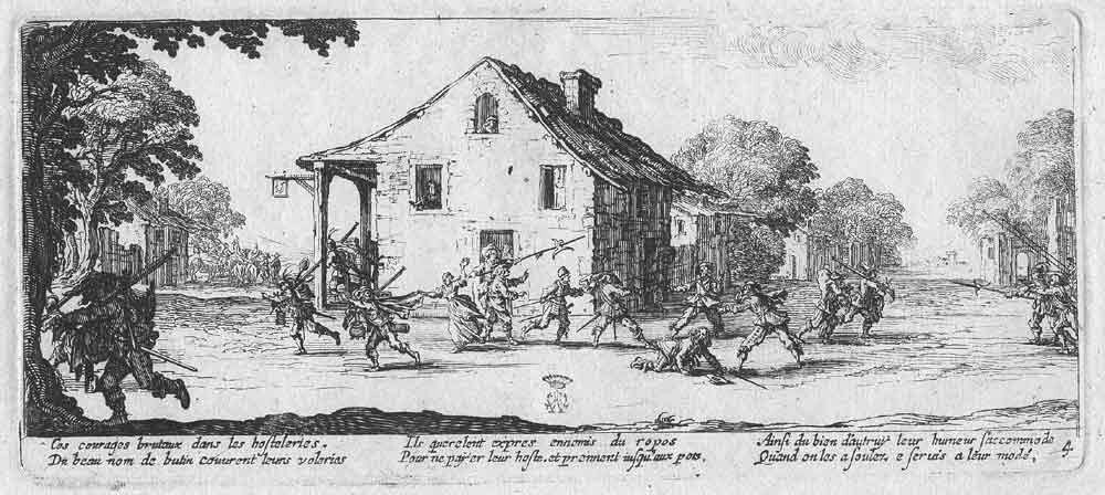 Vielfach im Netz